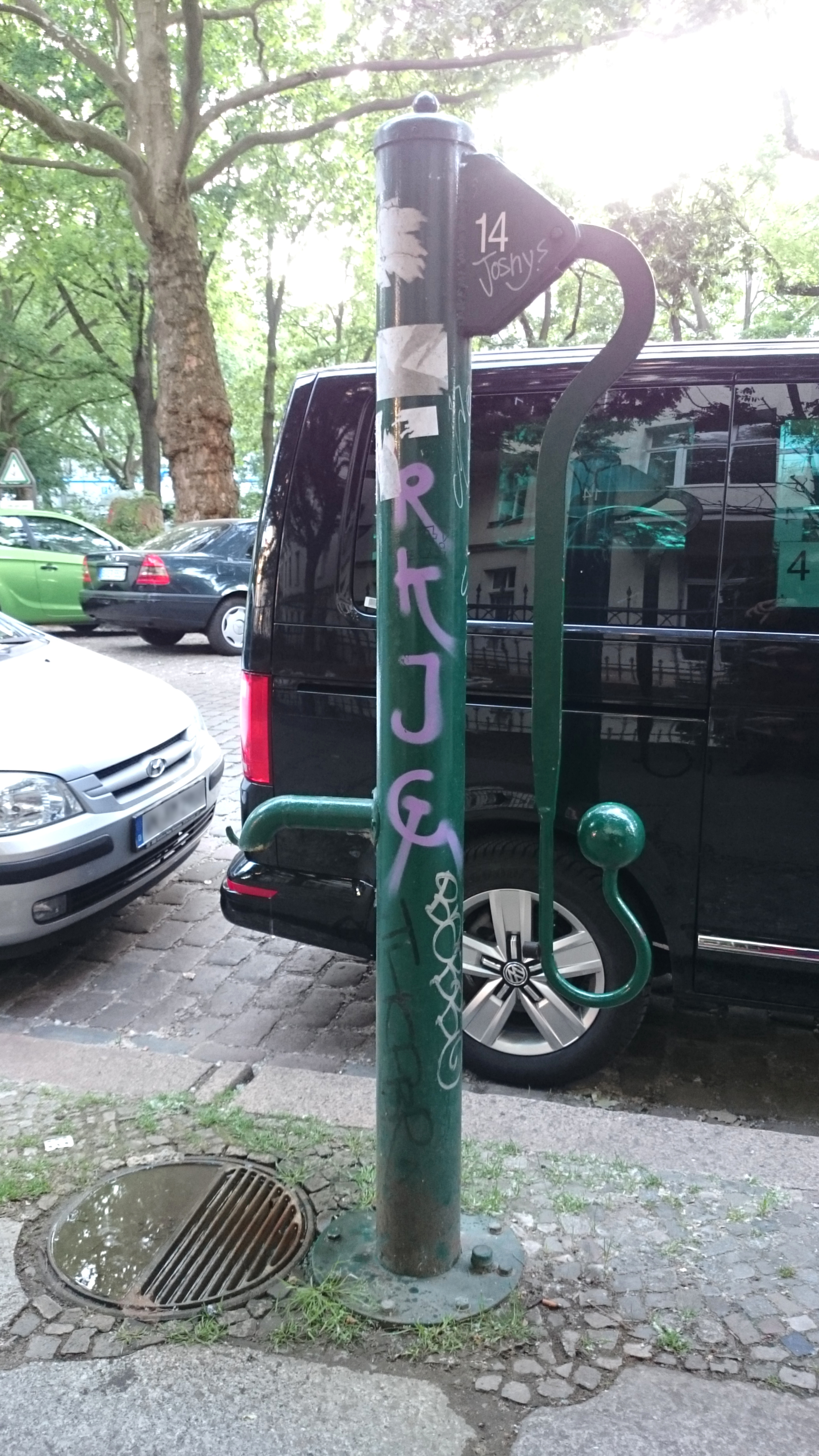 Berliner Straßenbrunnen am Erkelenzdamm (Höhe Nr. 23) im Ortsteil Kreuzberg.